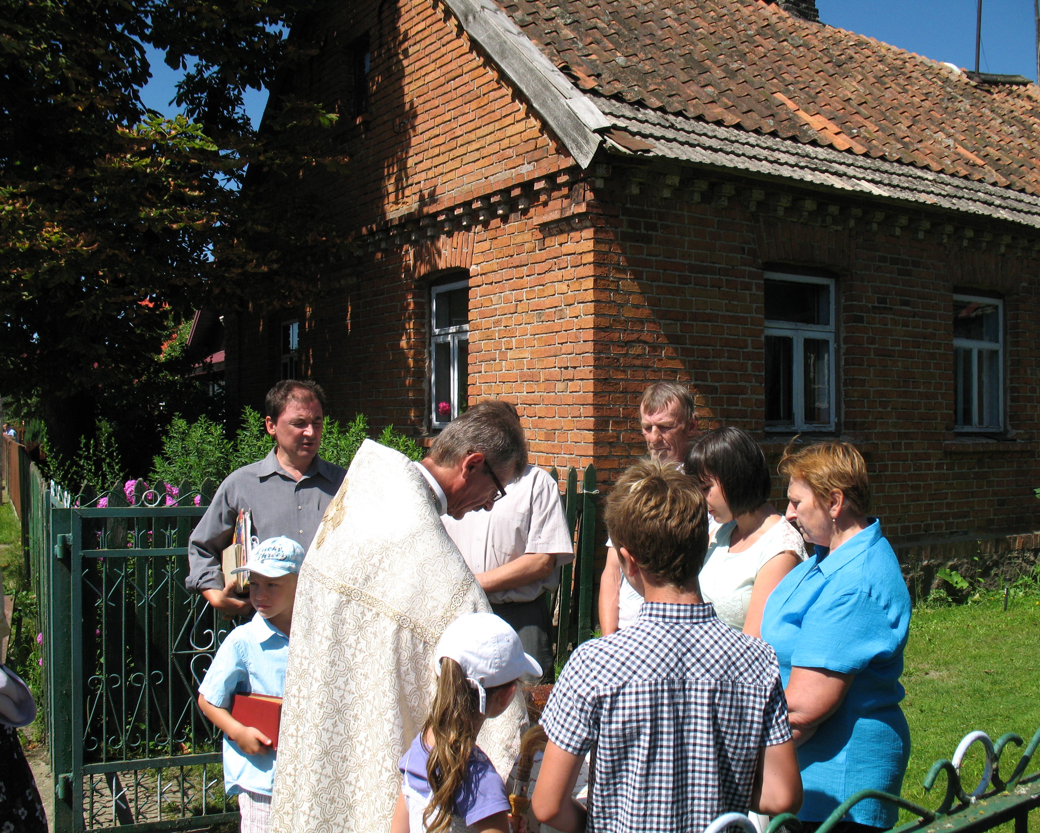 Soce podczas obchodu wsi.